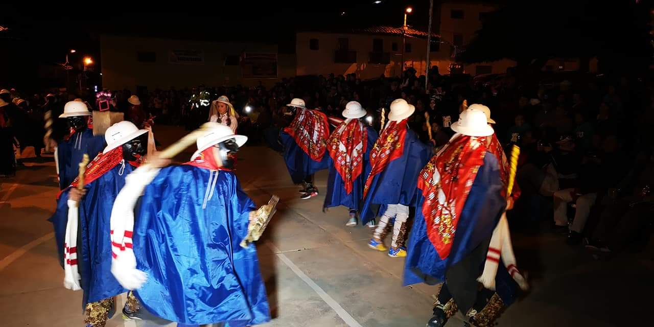 Zambos de Vispera